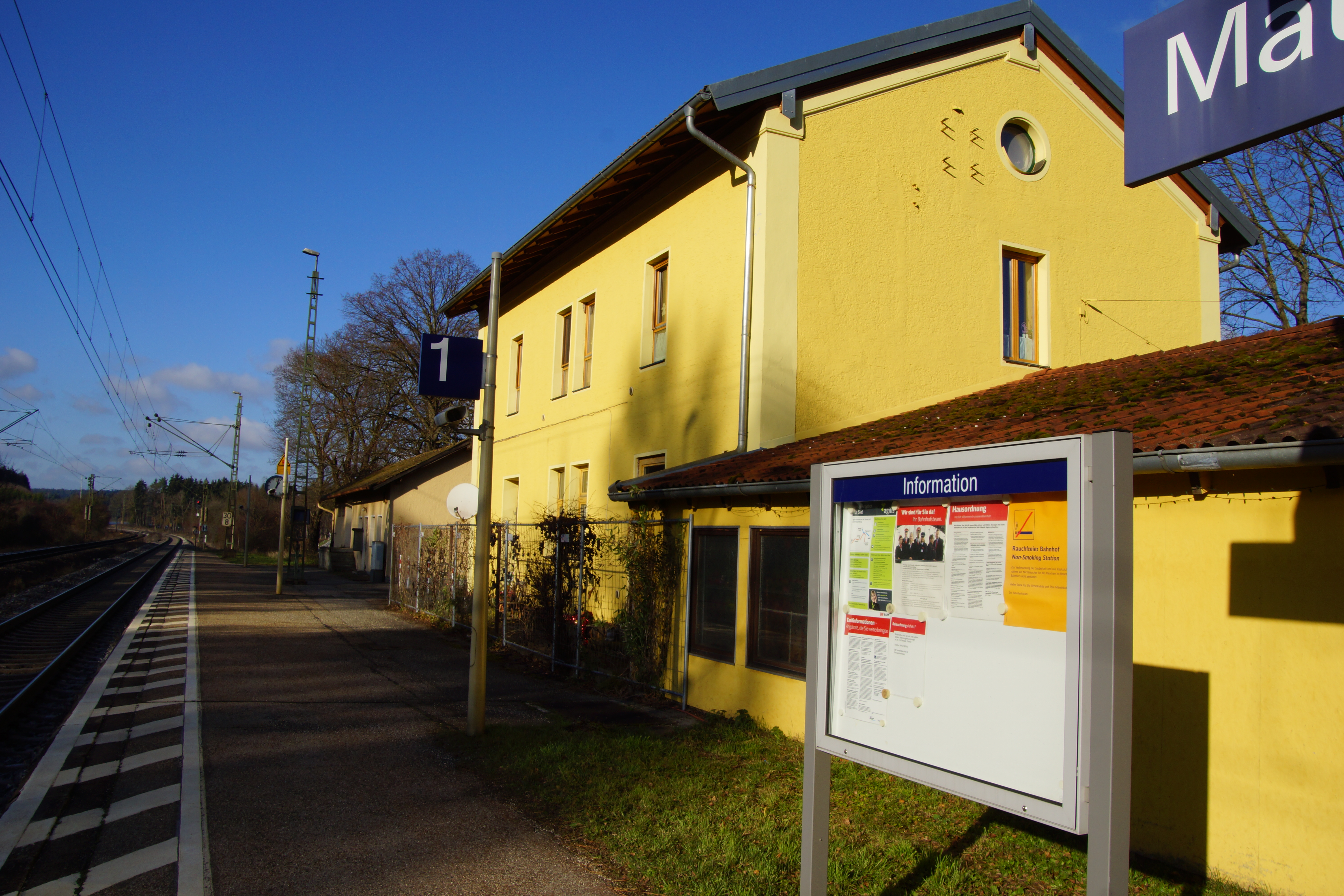 Der Bahnhof von Mausheim bei Beratzhausen in der Oberpfalz